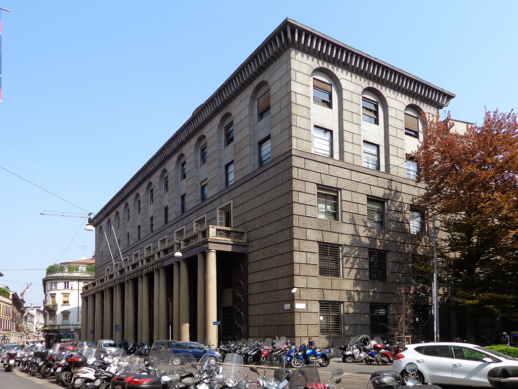 Milano, edificio in via Giuseppe Verdi 8 (angolo via Monte di Pietà), costruito dal 1934 al 1940 come ampliamento della sede storica della Cariplo, su progetto di Giovanni Greppi e Giovanni Muzio.Fonte: Maurizio Boriani, Corinna Morandi, Augusto Rossari, Milano contemporanea. Itinerari di architettura e di urbanistica, Maggioli Editore, 2007, p. 109. ISBN 978-88387-4147-6 Invalid ISBN.